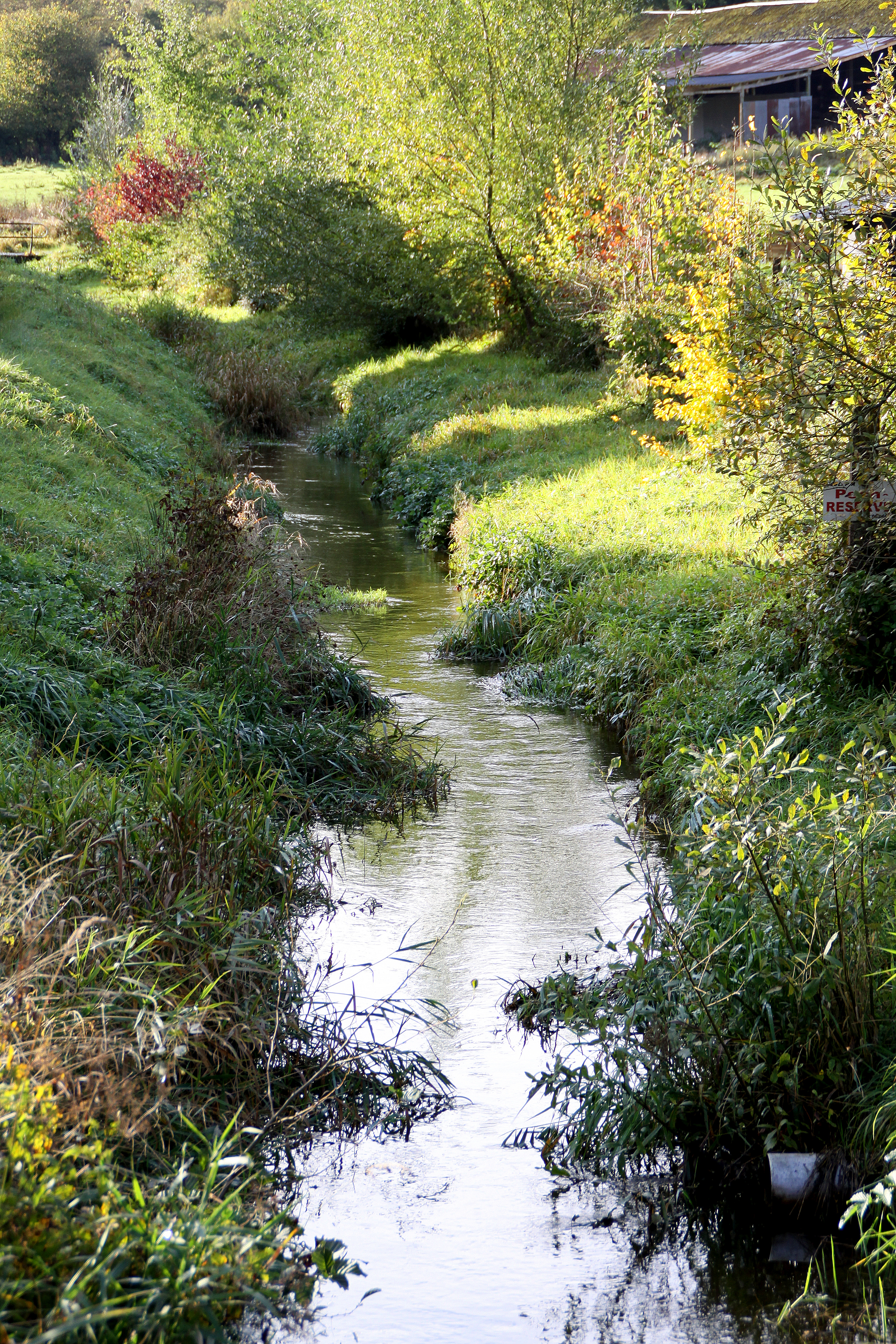 D'Moyémont op der ënneschter Bréck zu Volaiville